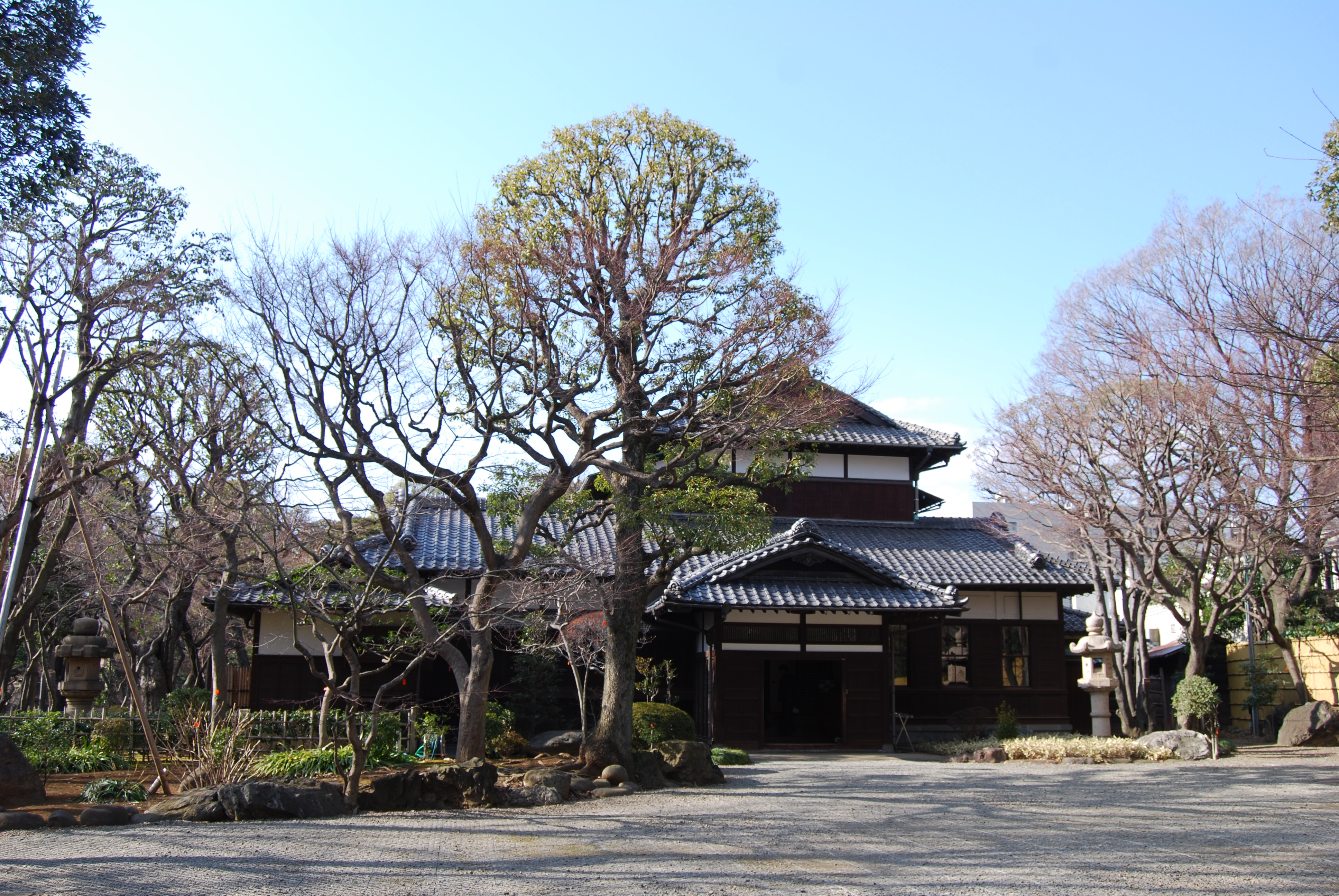 旧朝倉邸 正面玄関